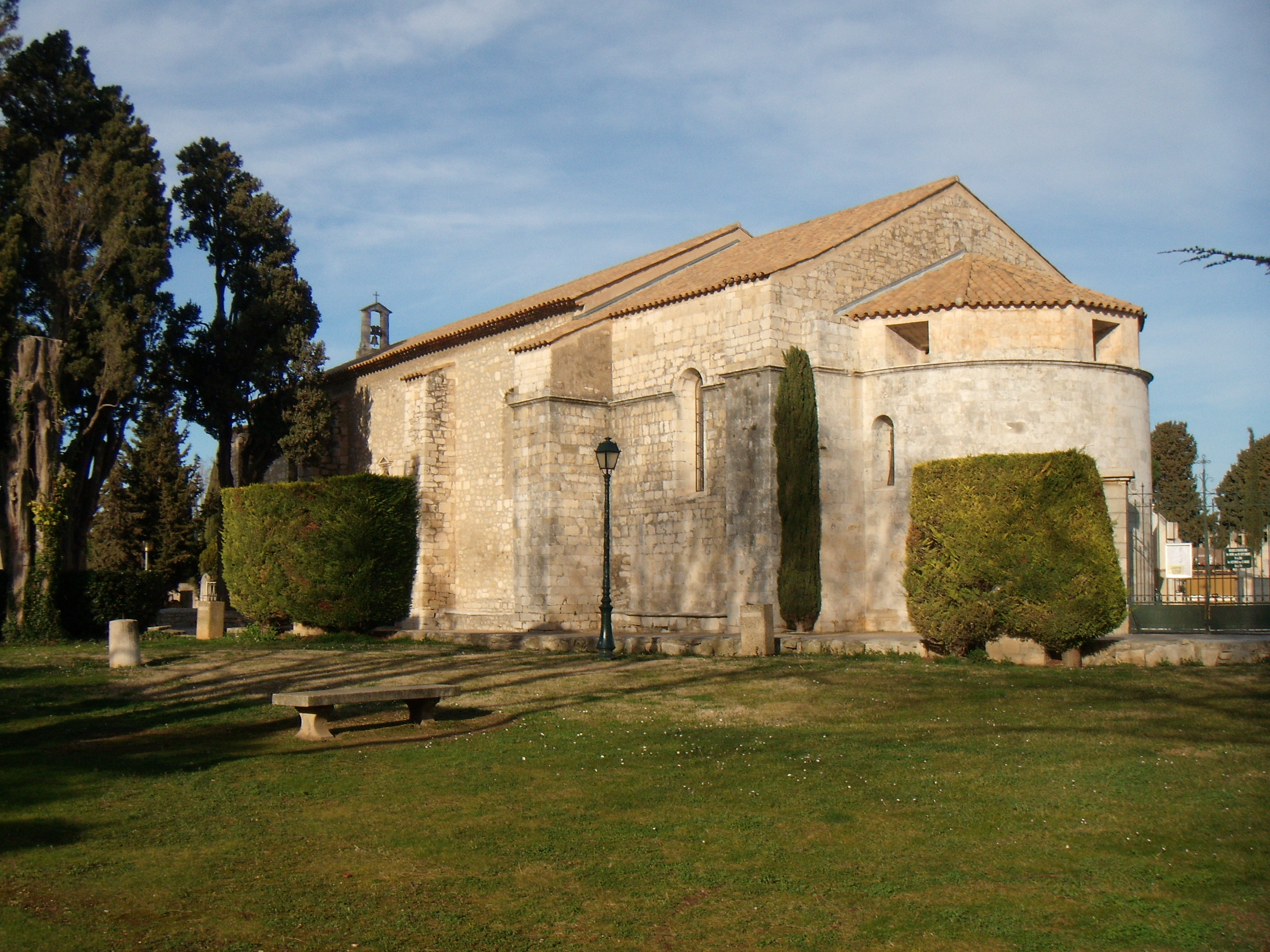 Chapelle Notre-Dame, Rue Gérard-Philippe (Inscrit, 1974) .